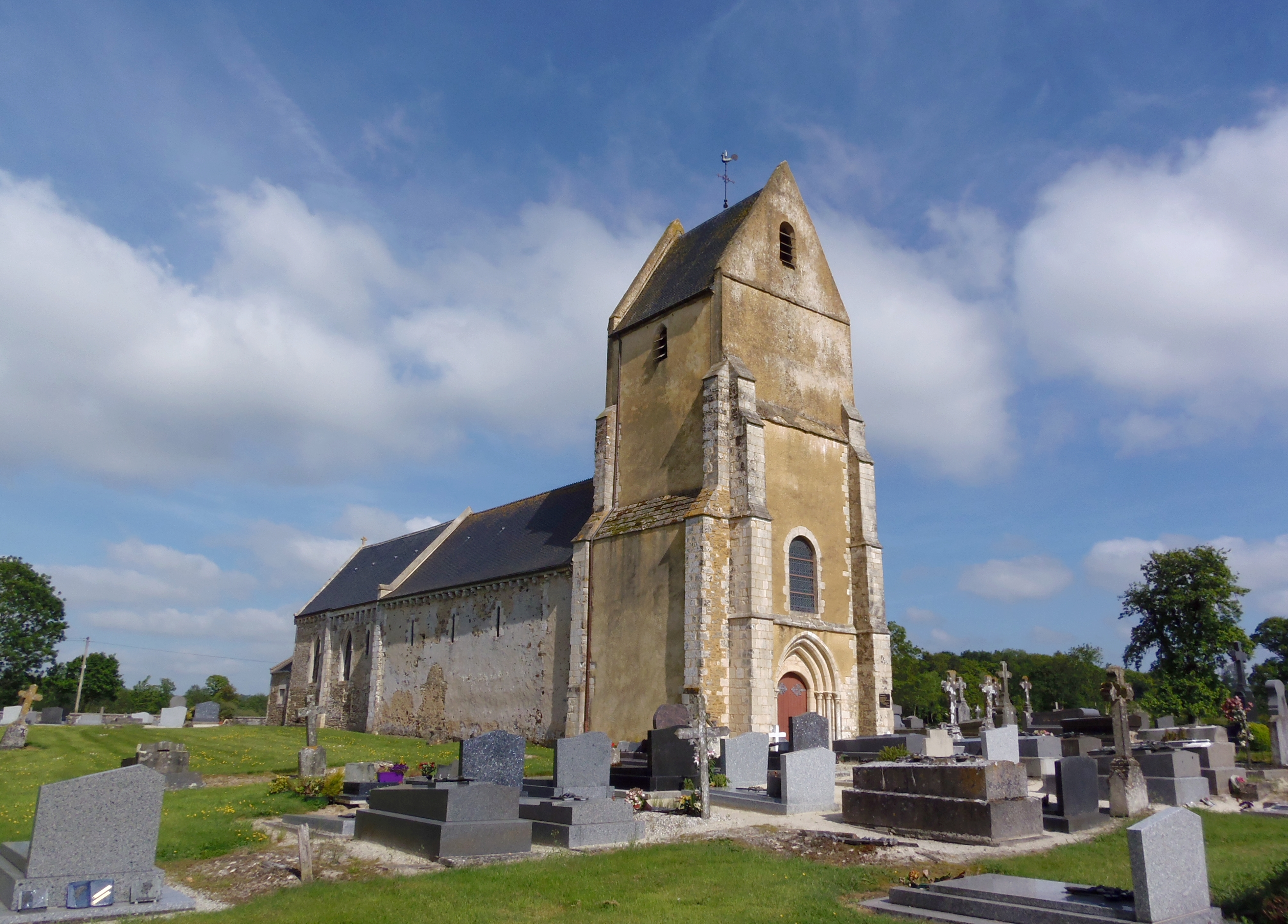 Torteval-Quesnay (Normandie, France). L'église Notre-Dame de Torteval.